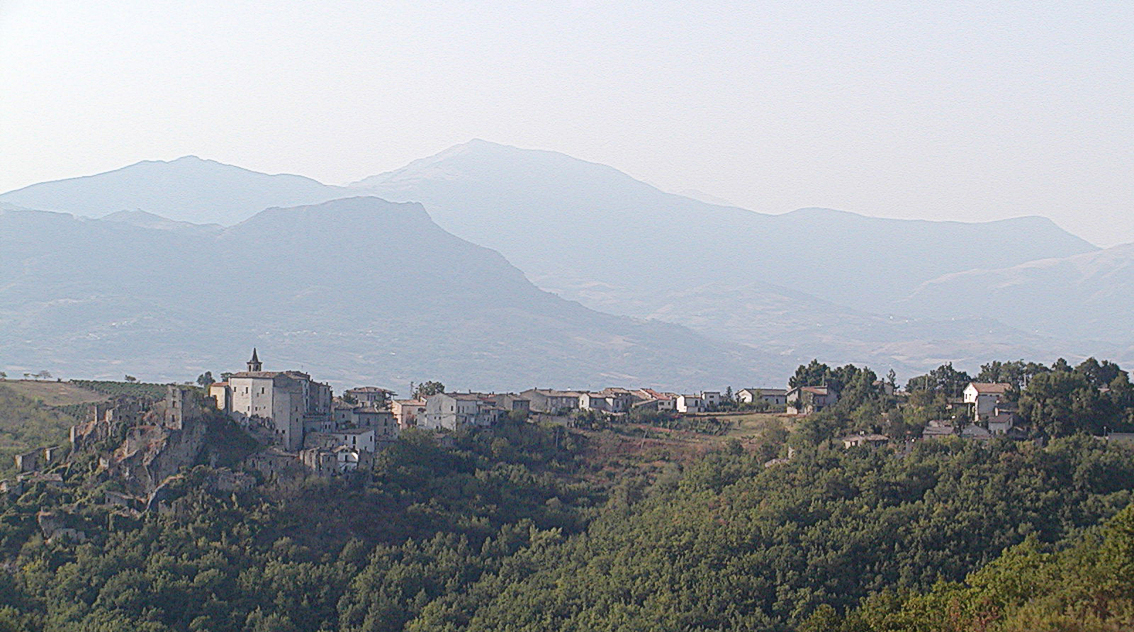 Bolognano di Introdacqua